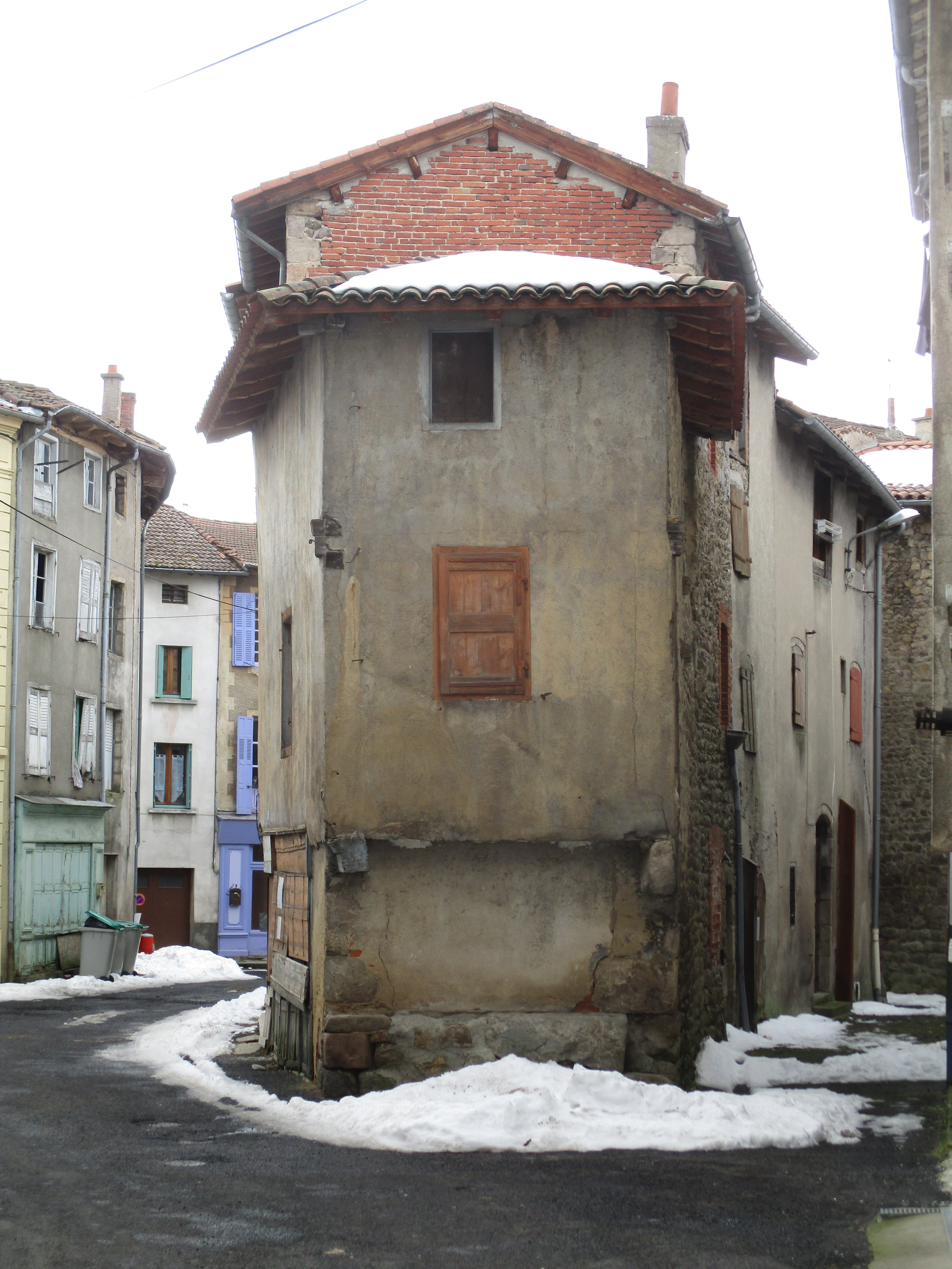 Maison de ville ancienne de Craponne sur Arzon avec échoppe